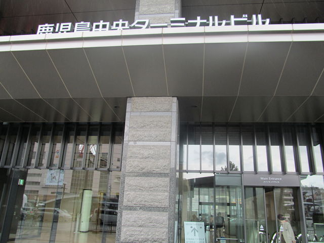 南国交通バスターミナル 鹿児島中央ターミナル 全体